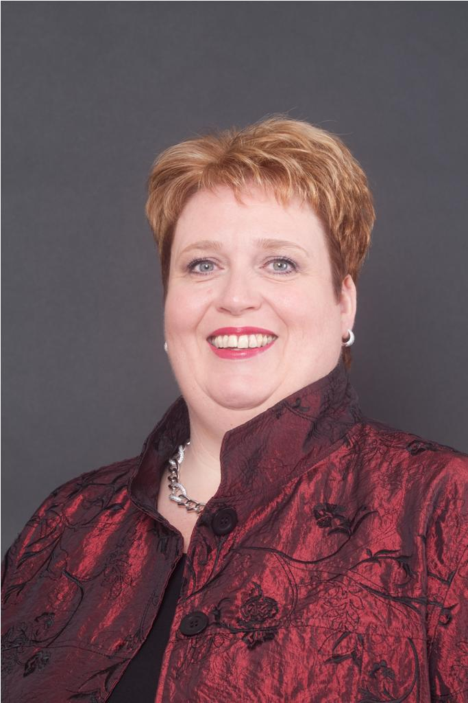 Wia Buze